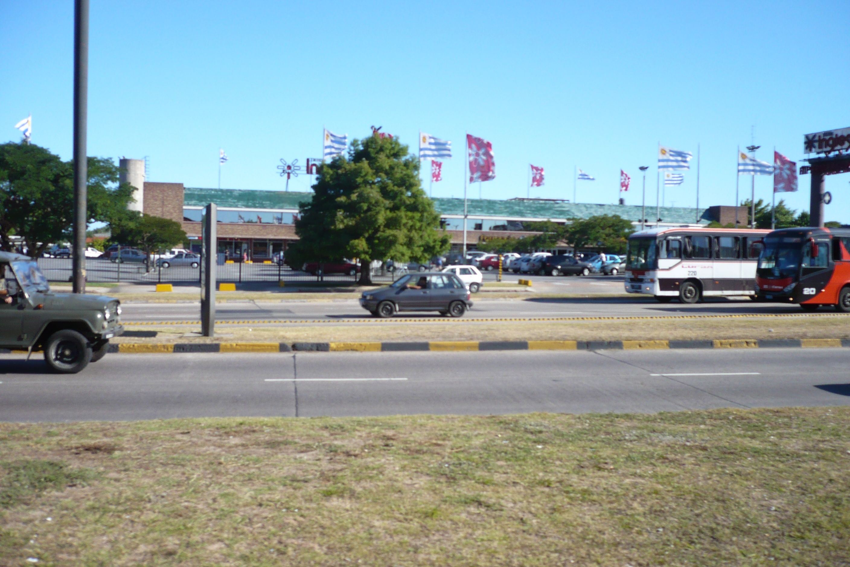 Tienda Inglesa Portones